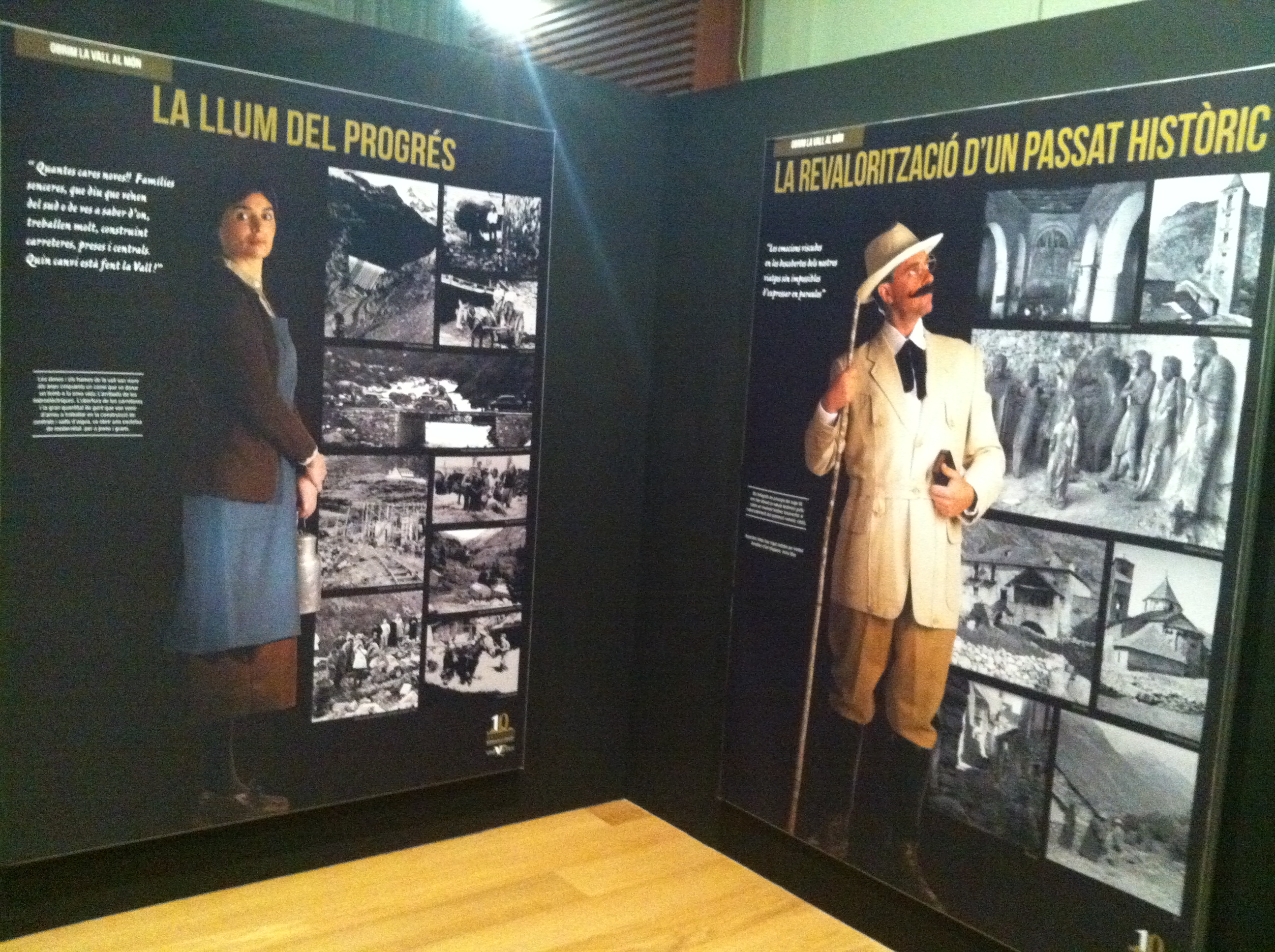 Palau Robert- Expo sobre la La Vall de Boí